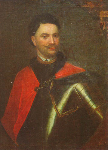 Беларуская (тарашкевіца): Партрэт Зьмітра Сангушкі (Źmicier Sanguška)